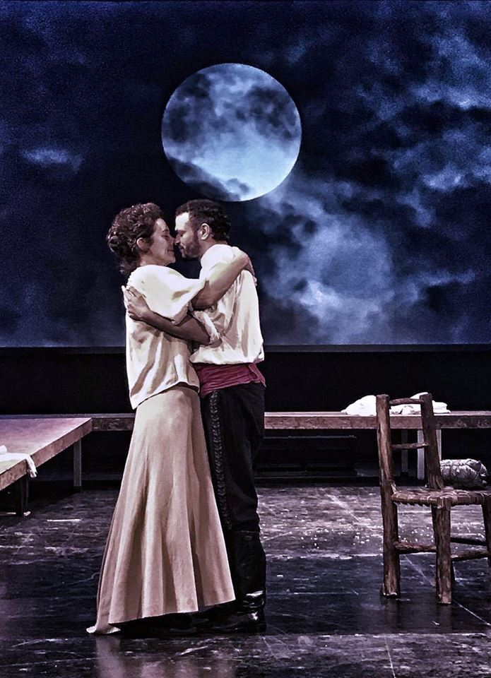 María Onetto y Agustín Rittano en Pequeño Estado de Gracia. Obra de Enrique Papatino. Teatro Cervantes. Argentina. 9-12-17